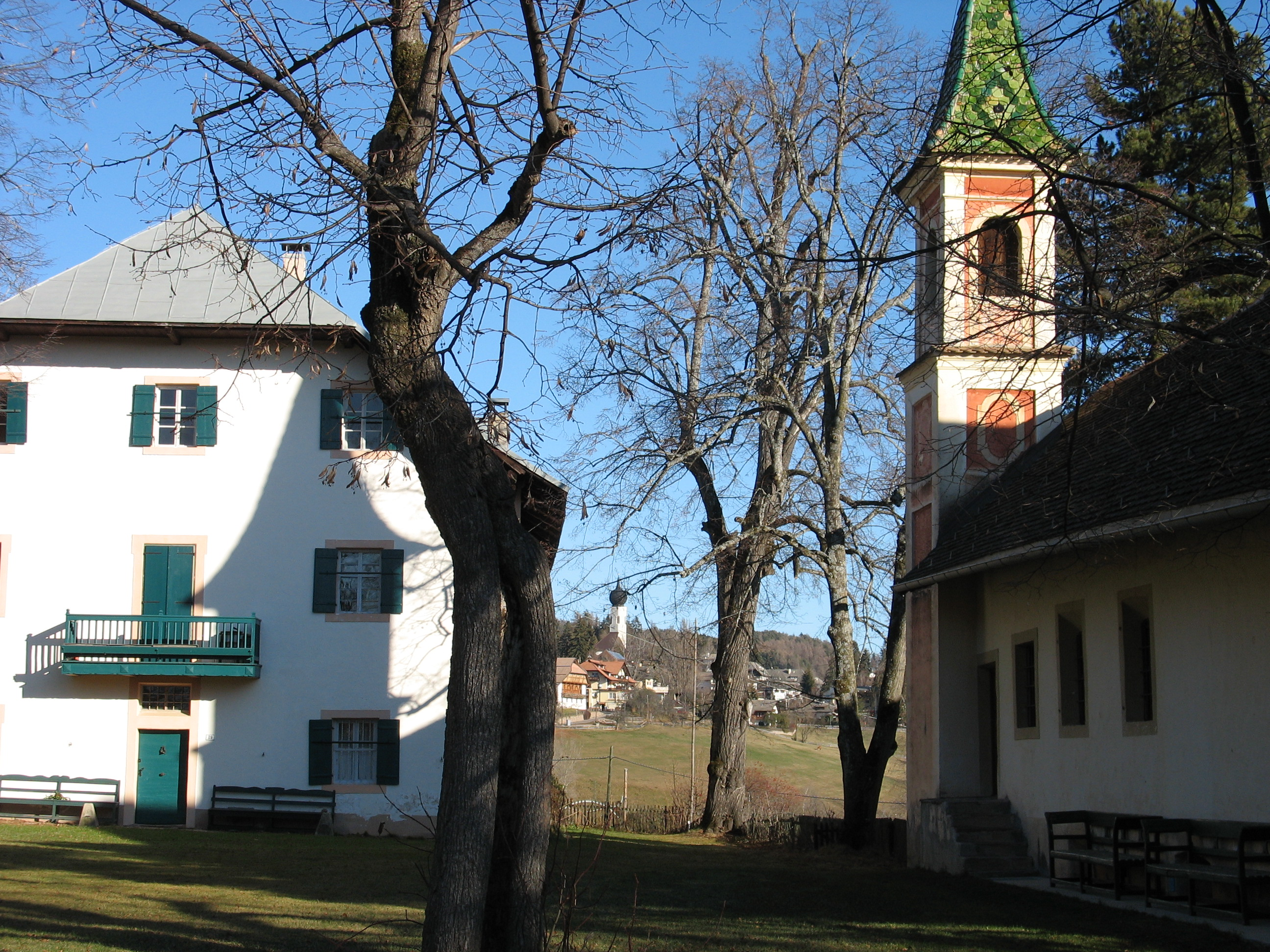 Links das Haus Braitenberg in Maria Himmelfahrt (Oberbozen), Geburtshaus von Hans von Hoffensthal, rechts die Magdalenenkapelle des Hauses Zallinger